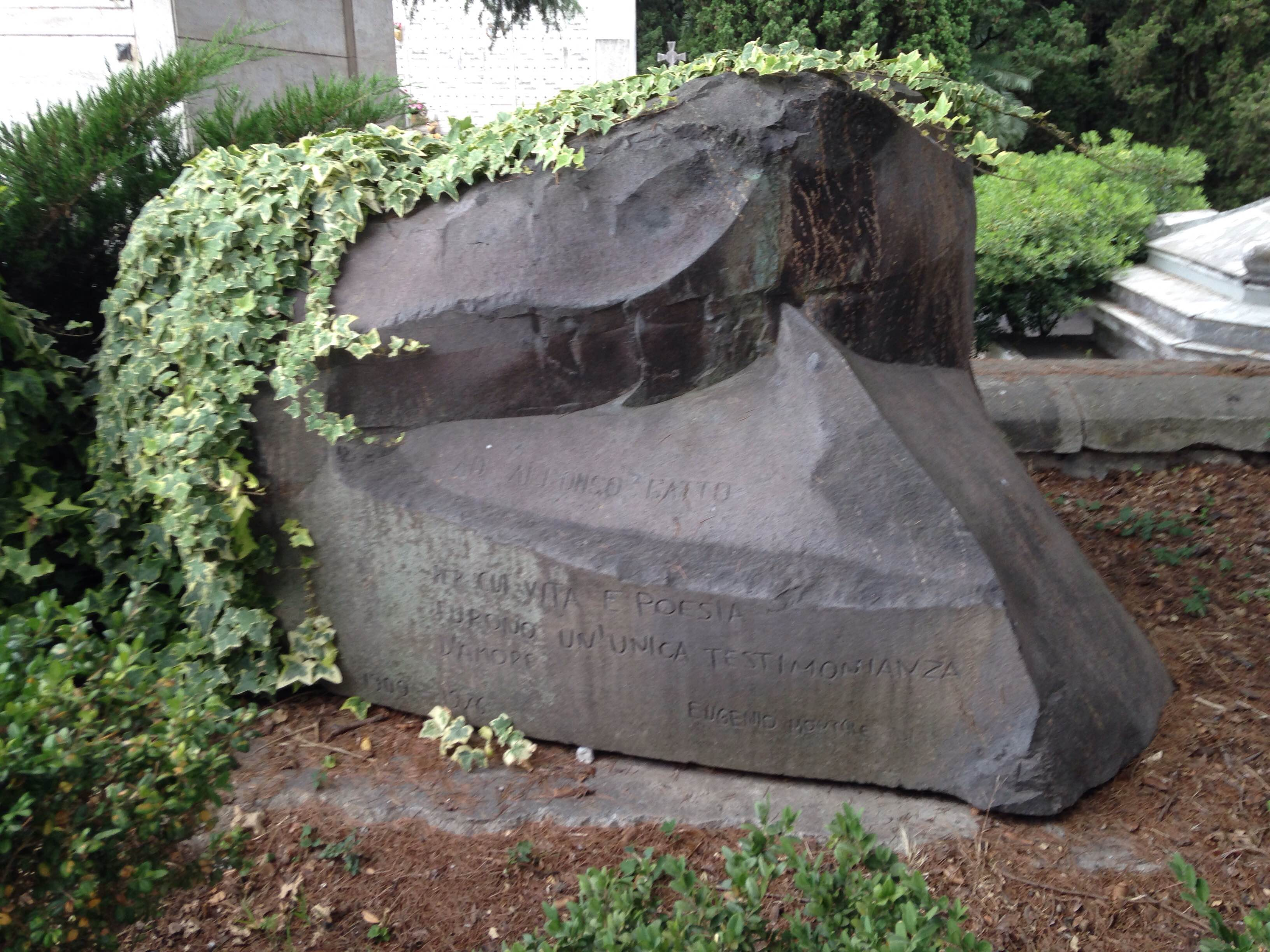 cimitero di Salerno